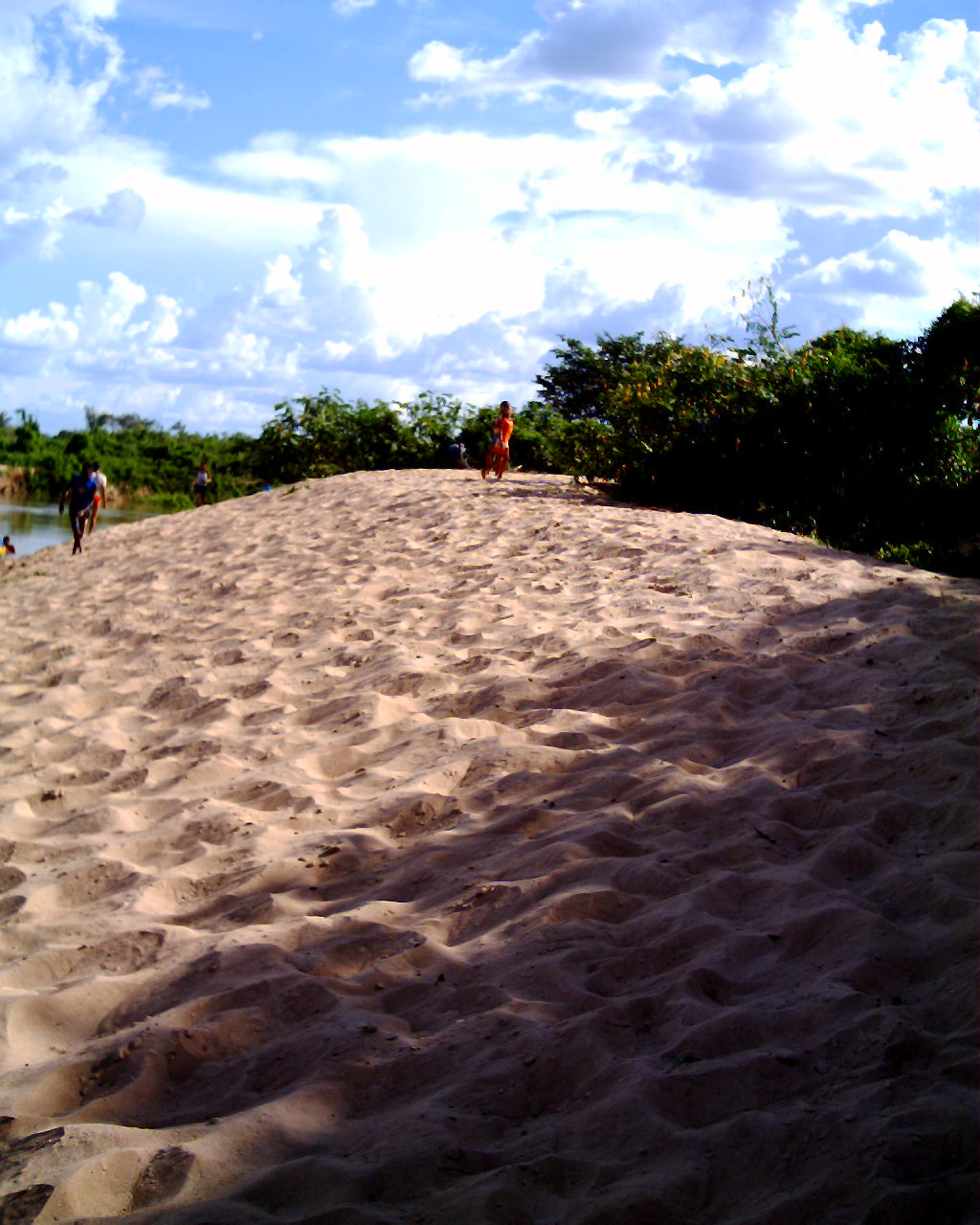 Balneário no Rio Mearim, Pedreiras, Maranhão, Brasil.